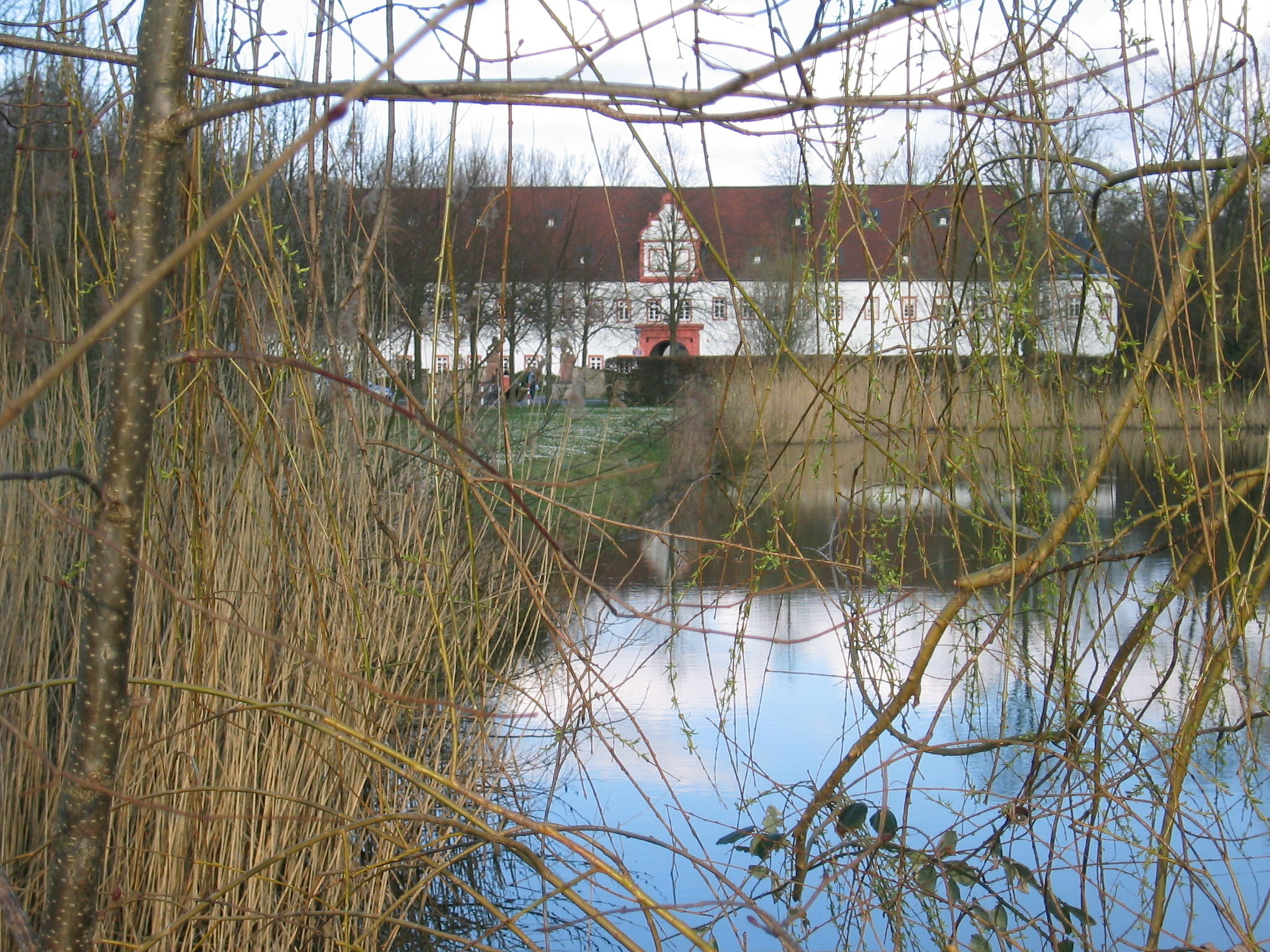 Heusenstamm, Schloss-Impression